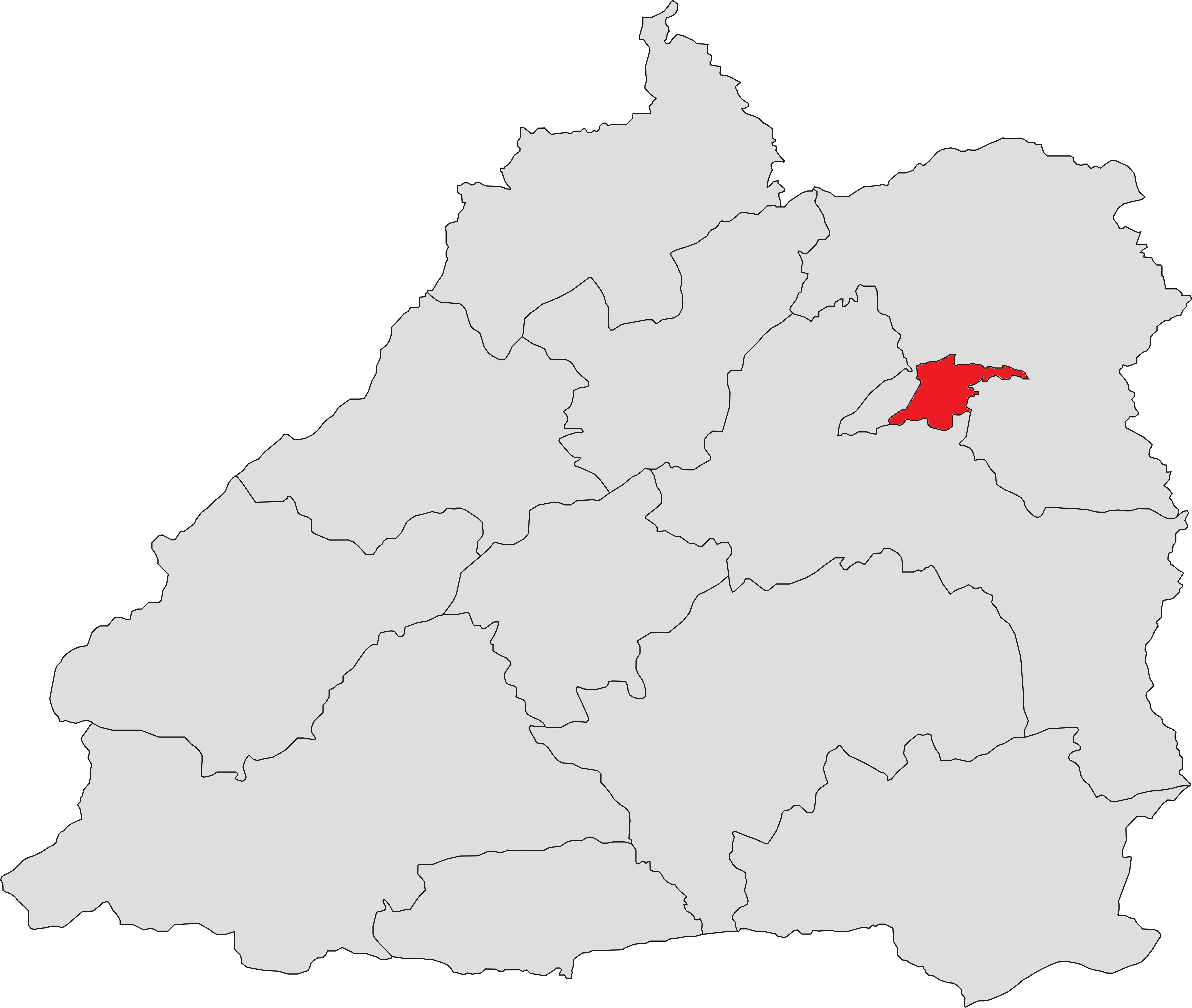 中文（中国大陆）: 芒市勐焕街道位置图